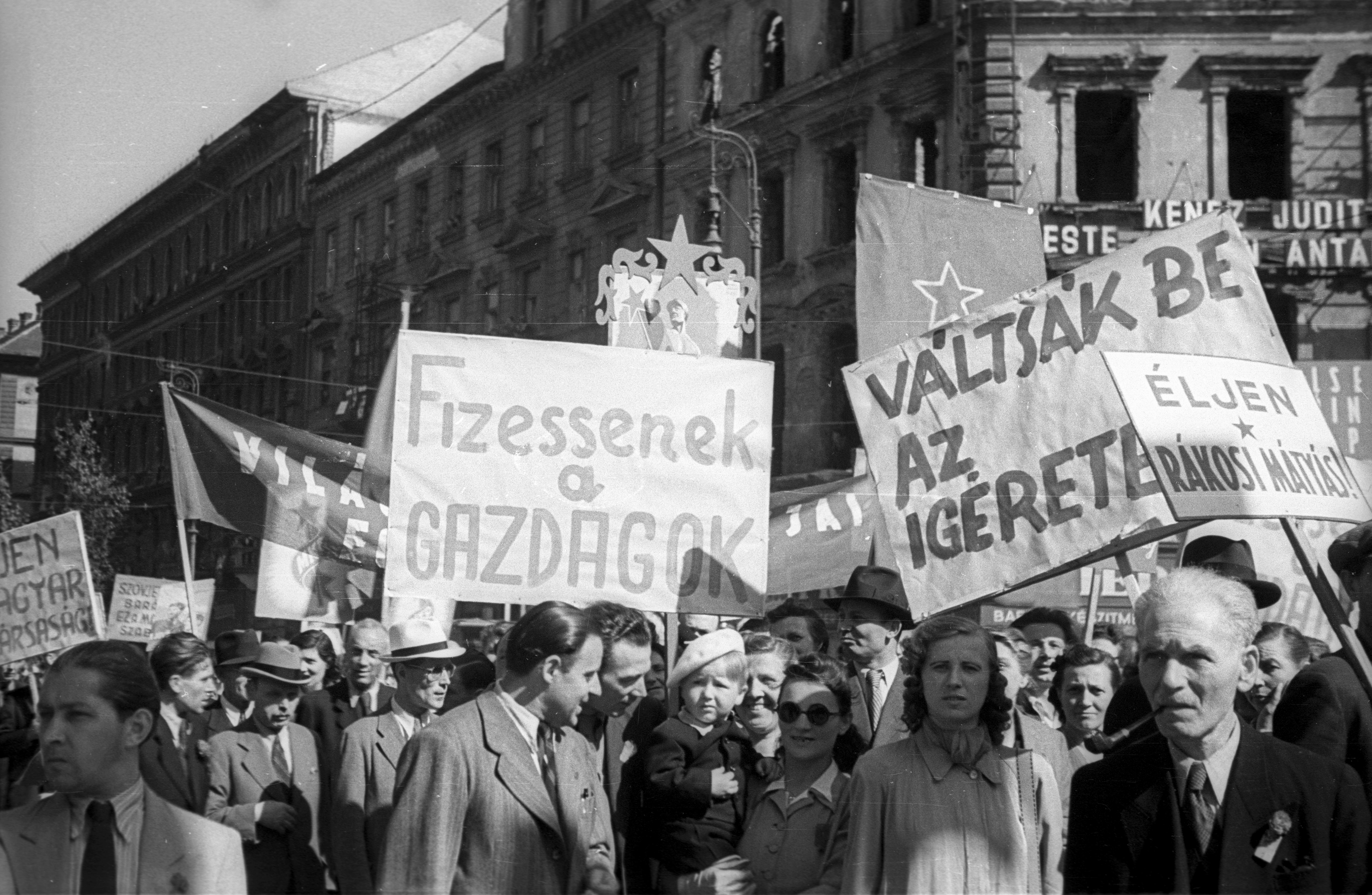 Oktogon a Teréz körút felé nézve, május 1-i ünnepség felvonulói. Location: Hungary, Budapest VI. Tags: Budapest Title: Oktogon a Teréz körút felé nézve, május 1-i ünnepség felvonulói.